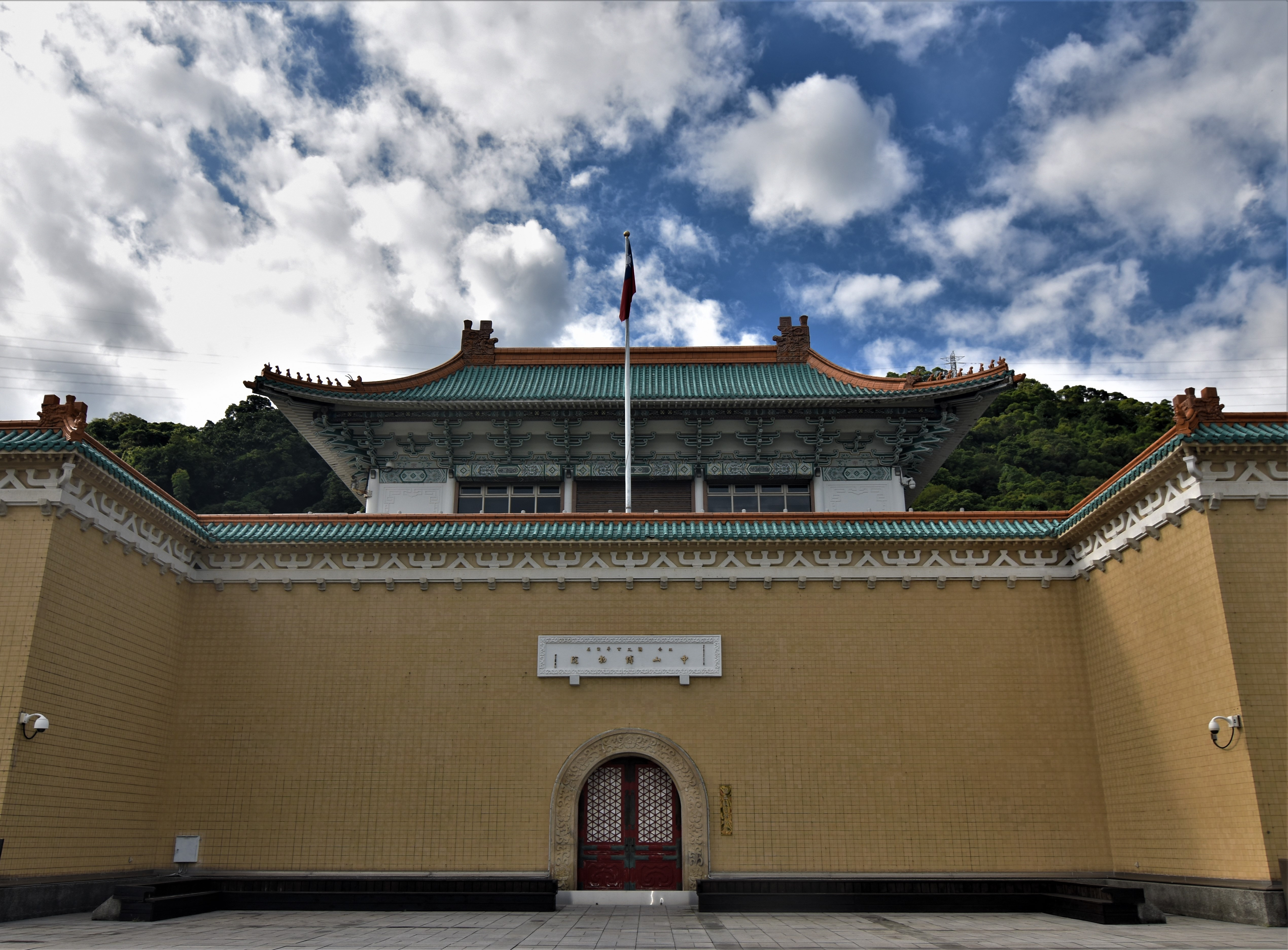 中文（台灣）: 國立故宮博物院收藏華夏文物，原多為過往古物陳列所舊藏，為熱河、瀋陽行宮所有三處清宮之文物，收藏品的年代幾乎囊括了整個中華文化五千年的歷史。 1001805,121.5466225